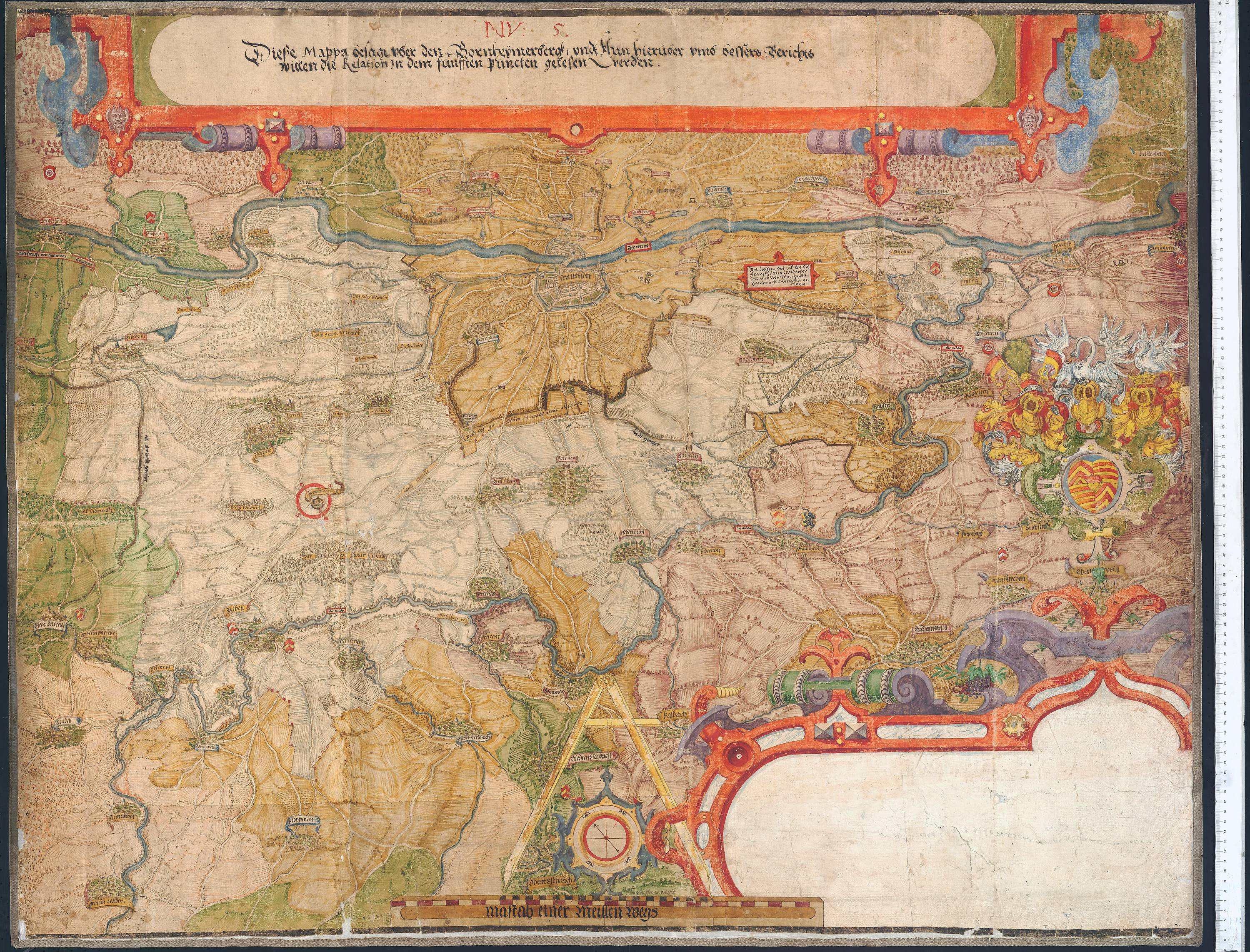 Karte über den Bornheimer Berg und Frankfurt, Gegend von Dörnigheim entlang am Main über Frankfurt bis Höchst, die Nidda entlang über Niederursel, Vilbel bis Groß-Karben, über Rendel und Bischhofsheim zurück an den Main, mit Darstellung von Offenbach, Kalbach, Kelsterbach, Schwanheim und Höchst, 1583 (Hessisches Staatsarchiv Marburg Karten Nr. R II 41). Zum Archivale